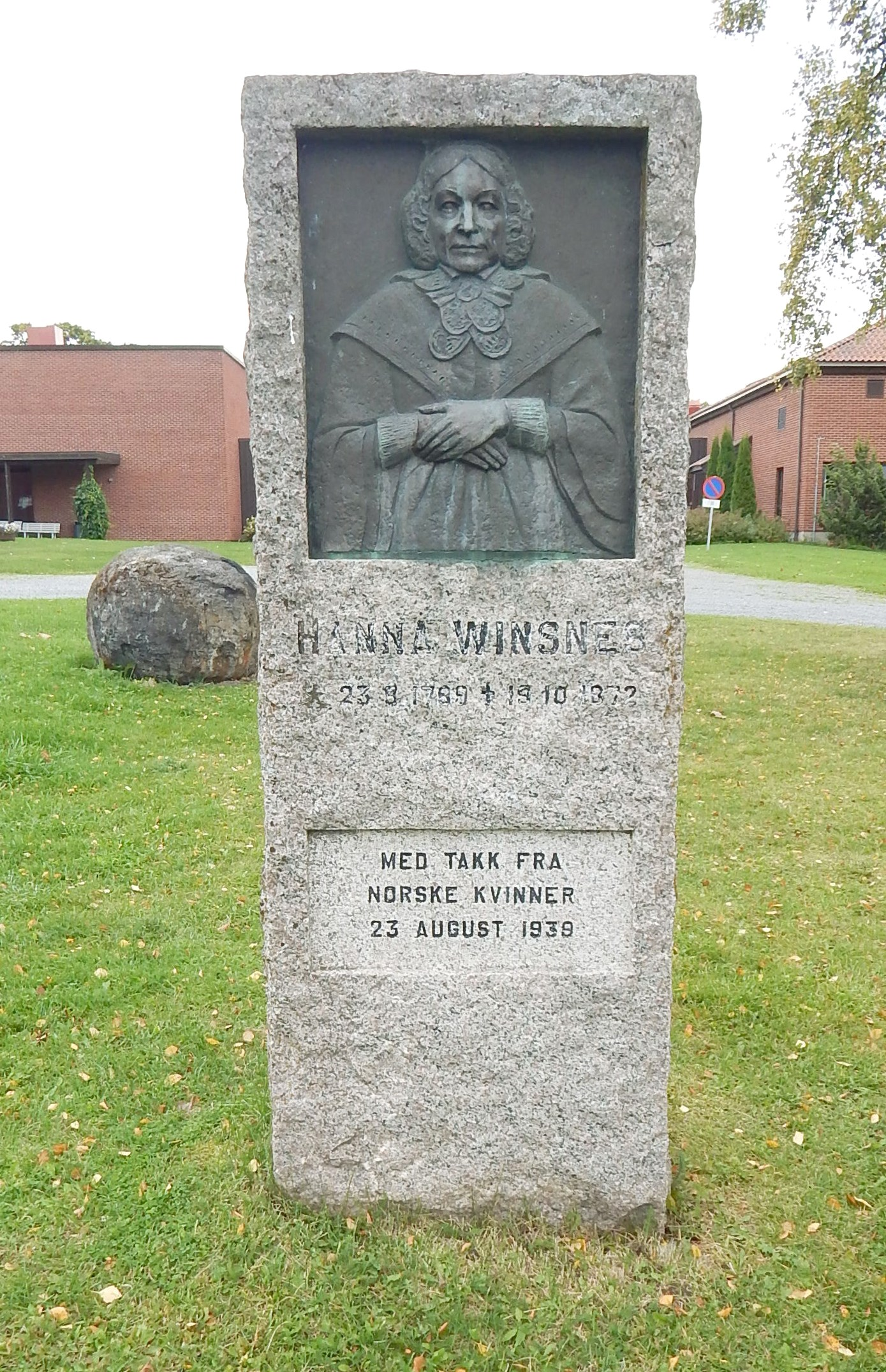 Minnesmerke over Hanna Winsnes ved Vang prestegård